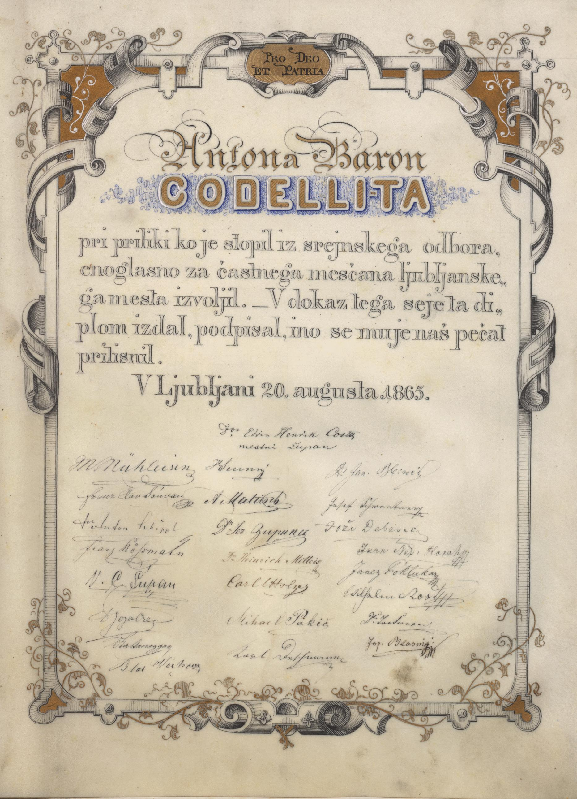 Srenjski odbor Ljubljane podeljuje diplomo častnega meščana Antonu baronu Codelliju.